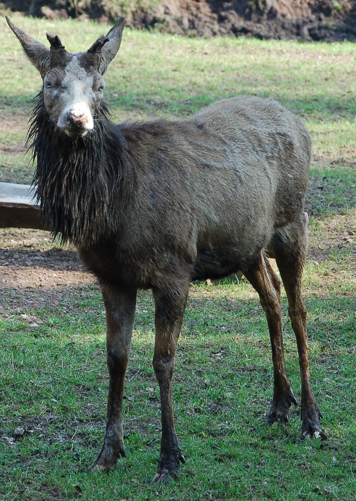 Rothirsch im Wildpark Eekholt.